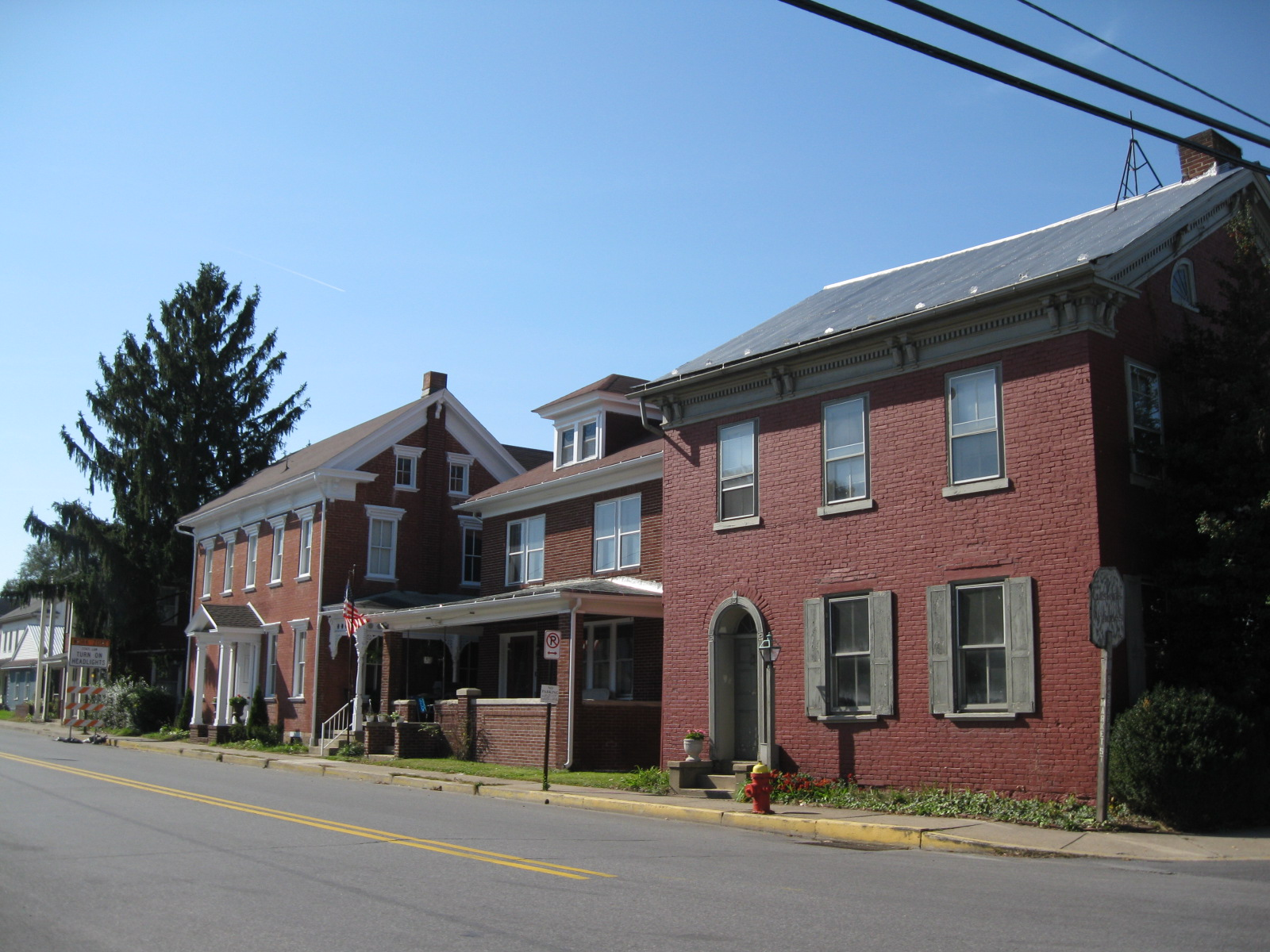 Selinsgrove, Pennsylvania